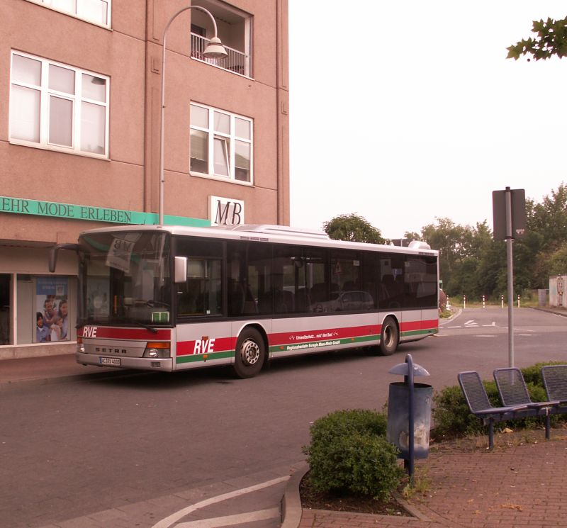 Heinsberger Land, City Center Heinsberg, Bus der RVE, auf der Fläche im Hintergrund war früher der Bahnhof, dieser soll um 2015 wieder errichtet werden und einen Anschluss bis Geilenkirchen-Lindern erhalten